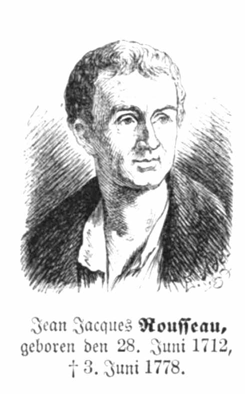 Jean Jaques Rousseau